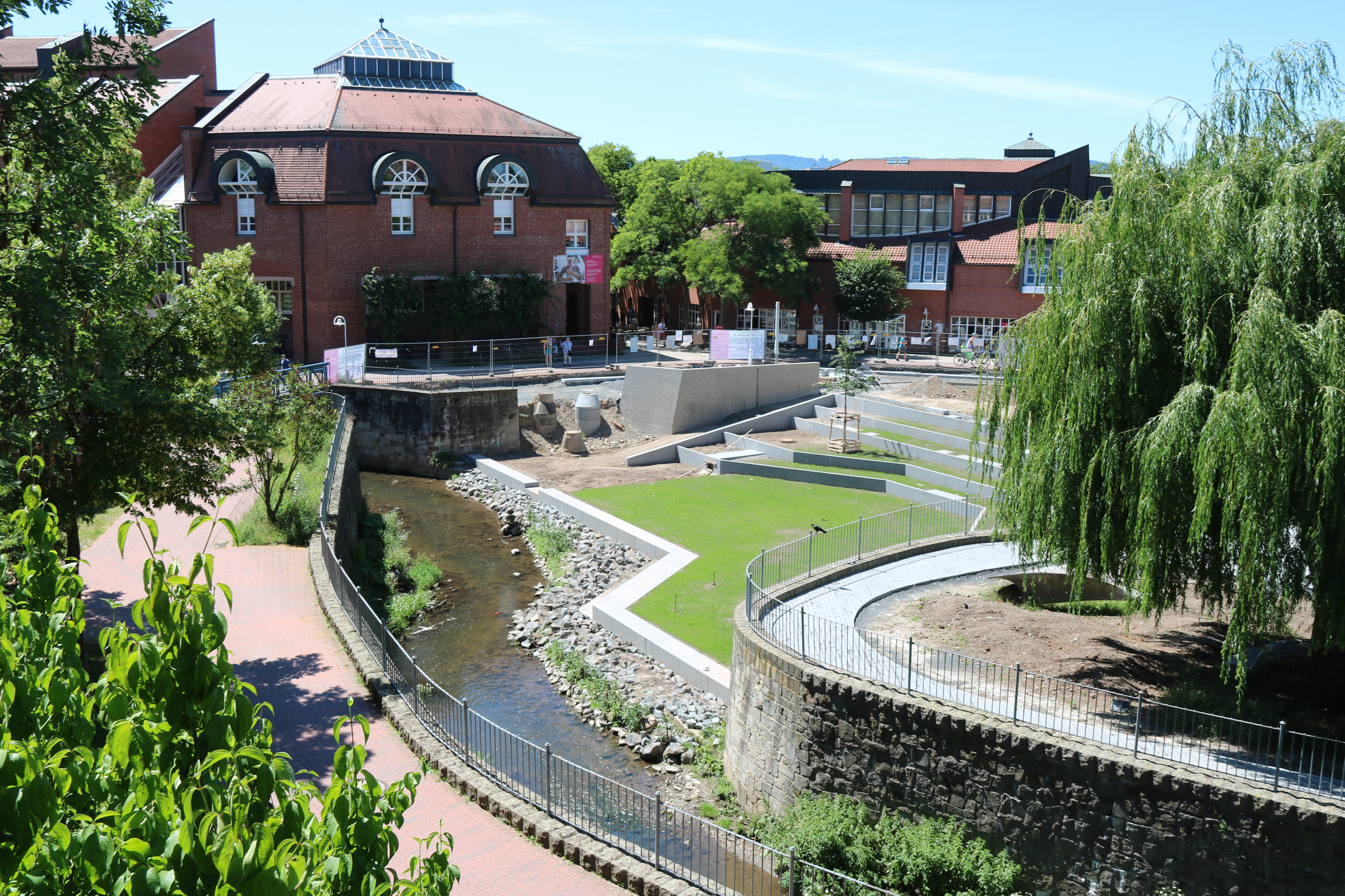 Universität Kassel, Vorplatz der Zentralmensa am Holländischen Platz.